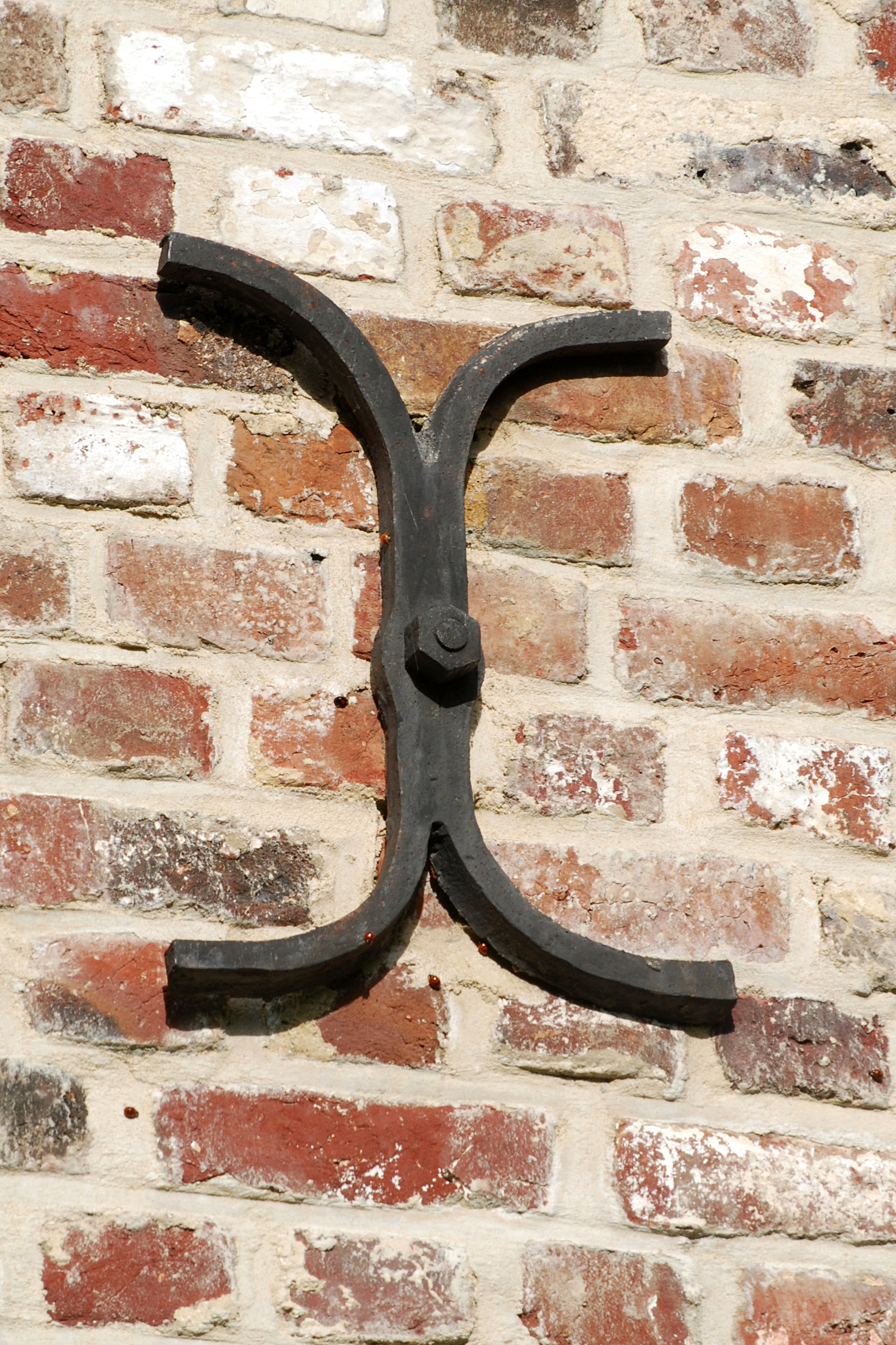 Belgique - Wallonie - Ottignies - Ferme du Douaire